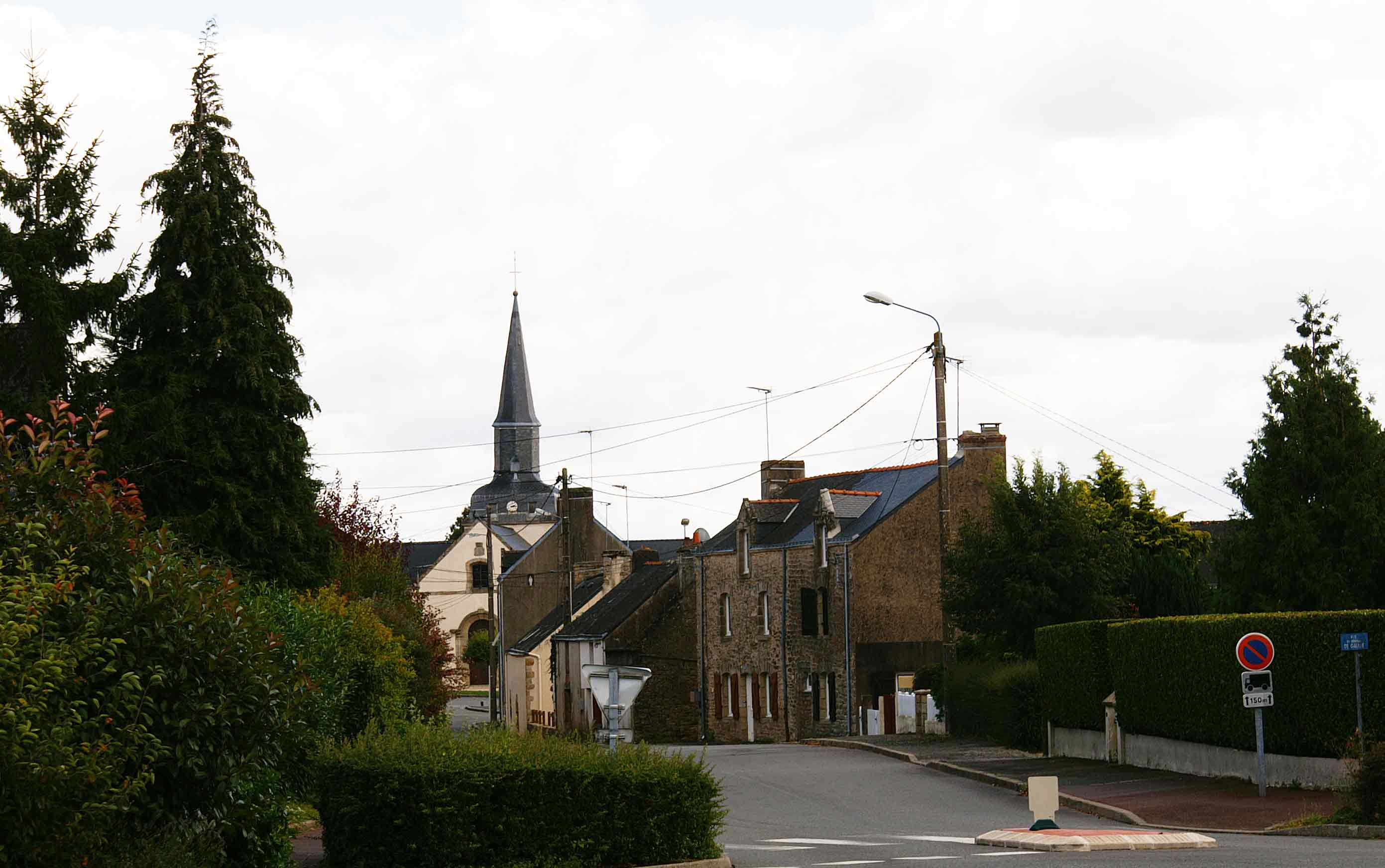 le bourg vue de la rue venant de Péaule